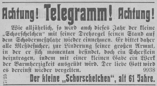 Annonce vum Schorschelchen an der Independance luxembourgeoise (28/29. August 1909)